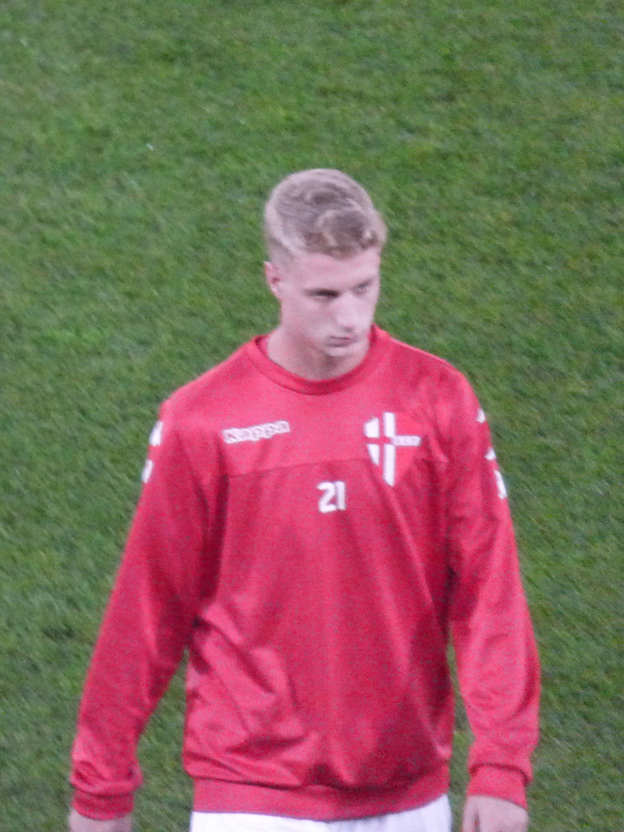 Davide Marcandella lors du match amical RC Lens - Calcio Padova, le 11 octobre 2018 au Stade Bollaert-Delelis de Lens.